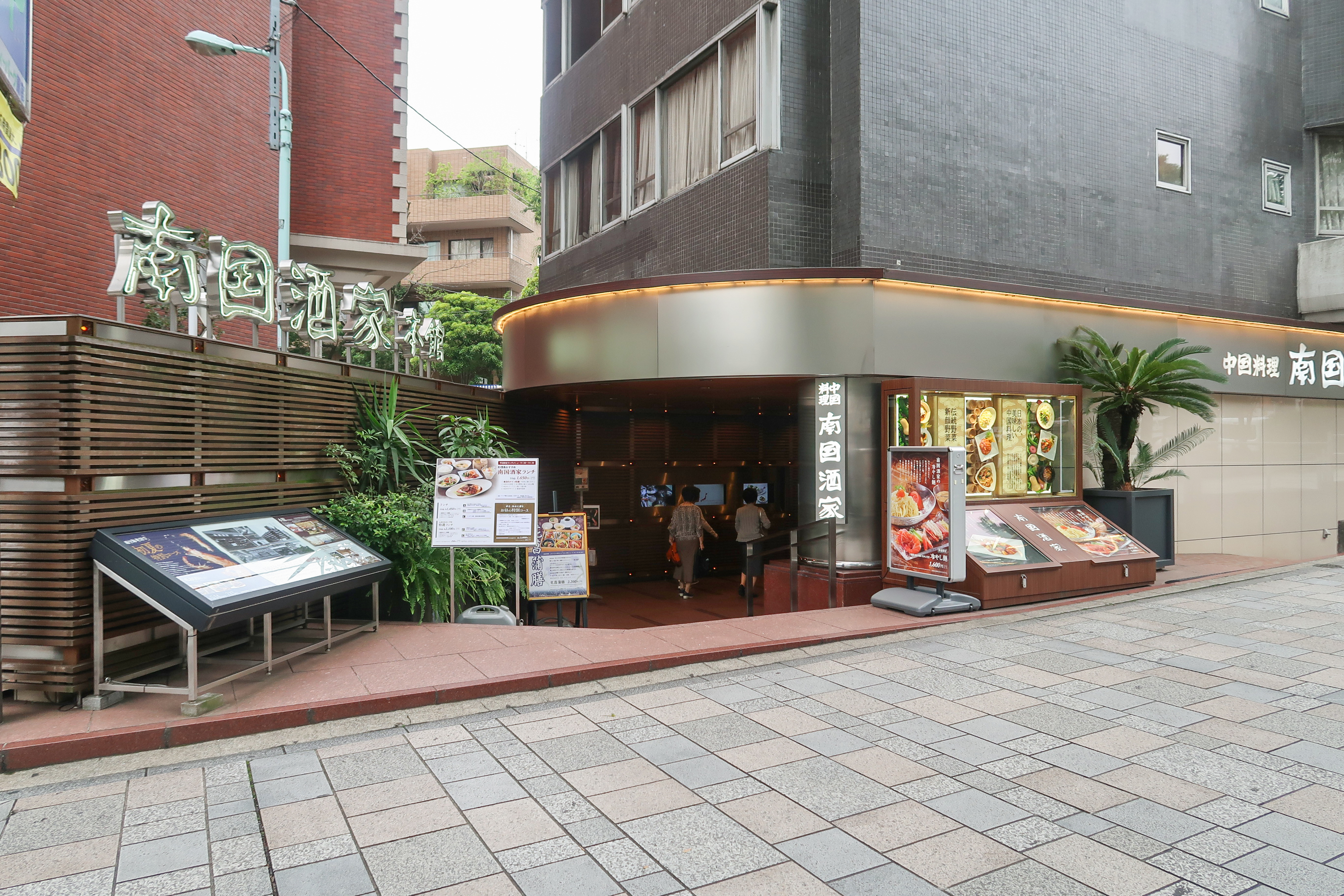 Nangoku Shuka Harajuku